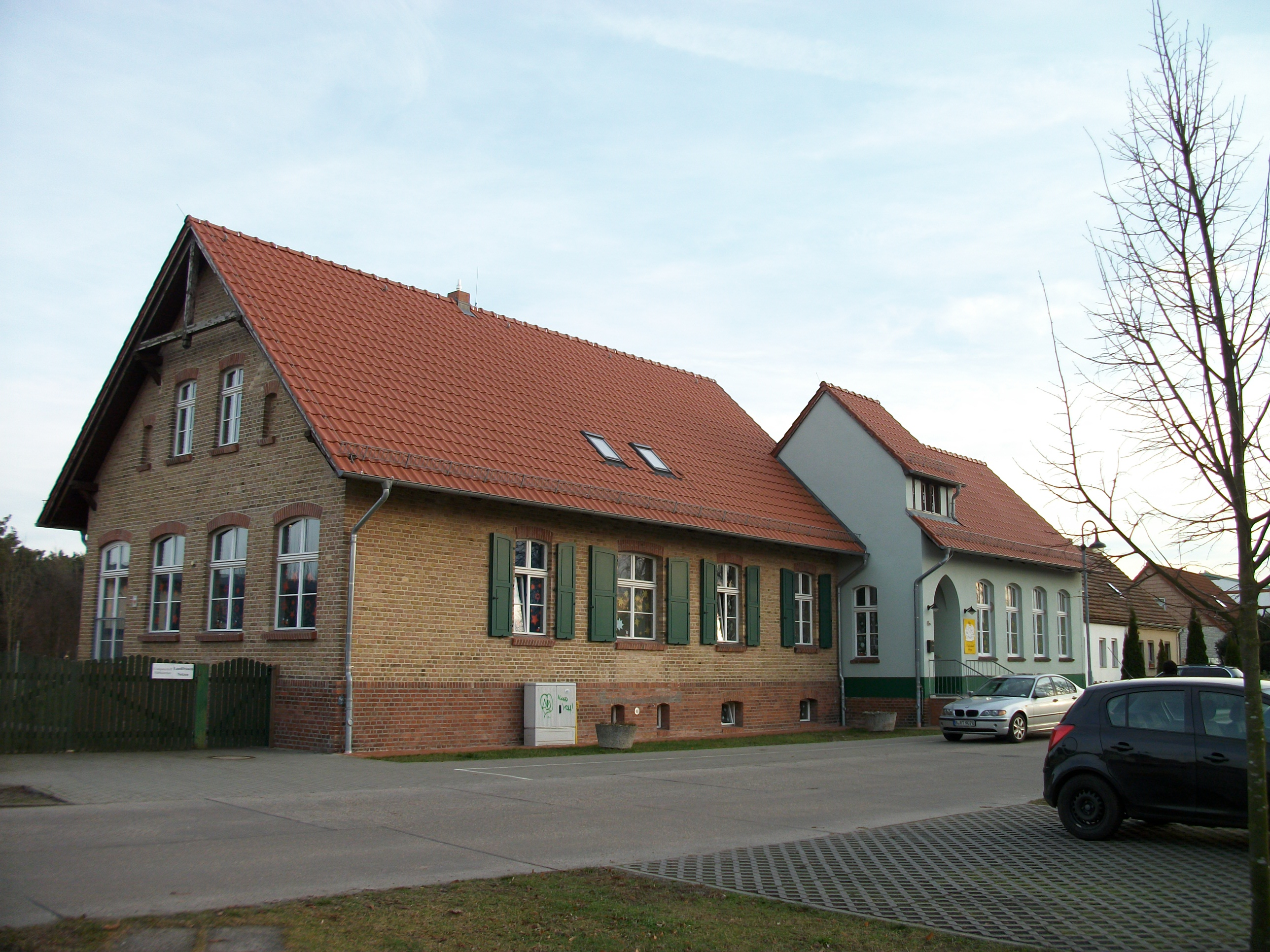 Denkmalgeschütztes Schulhaus von 1898 in Netzen, Gemeinde Kloster Lehnin